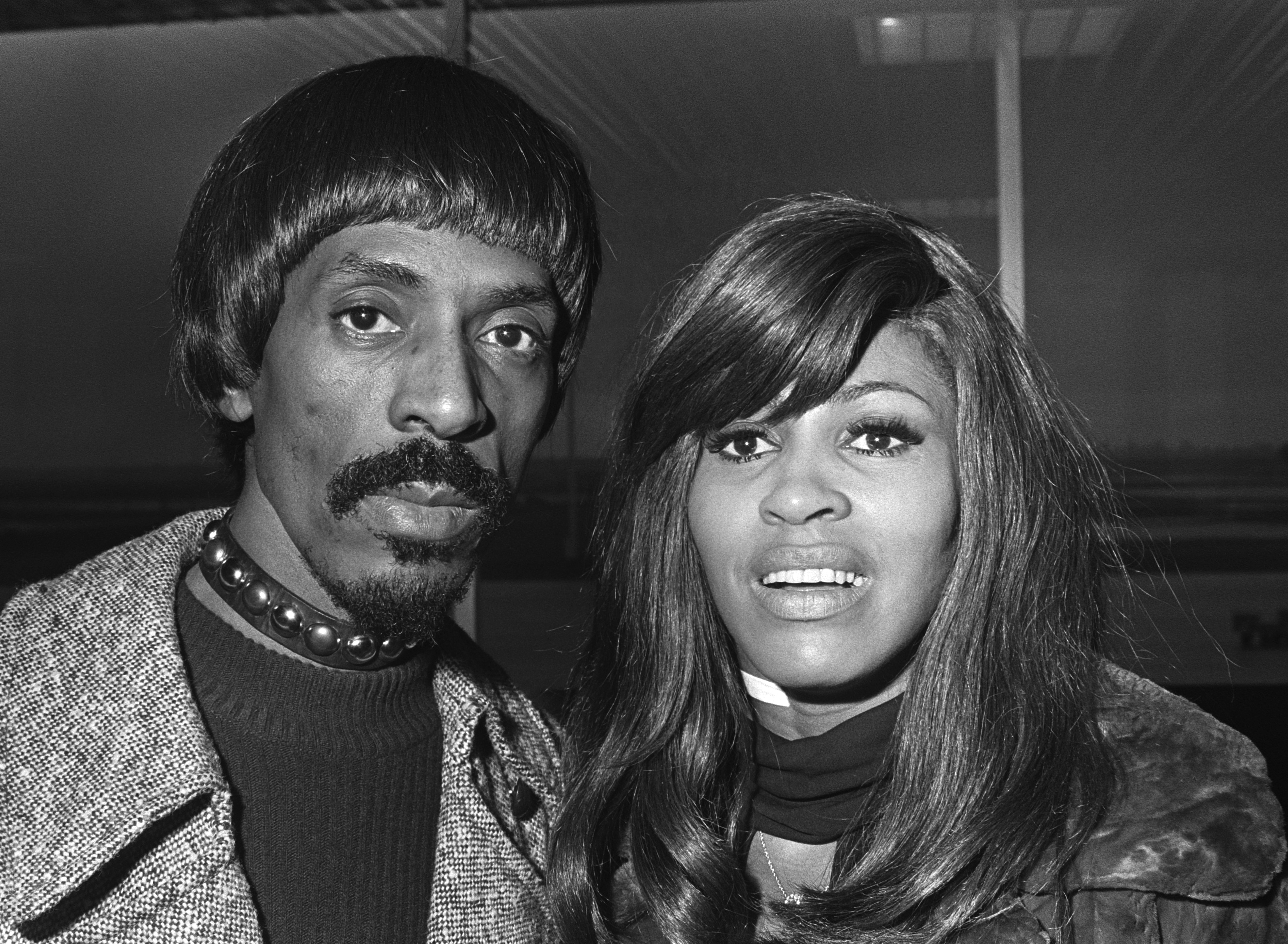 Amerikaans duo Ike en Tina Turner arriveren op Schiphol. Ike & Tina Turner